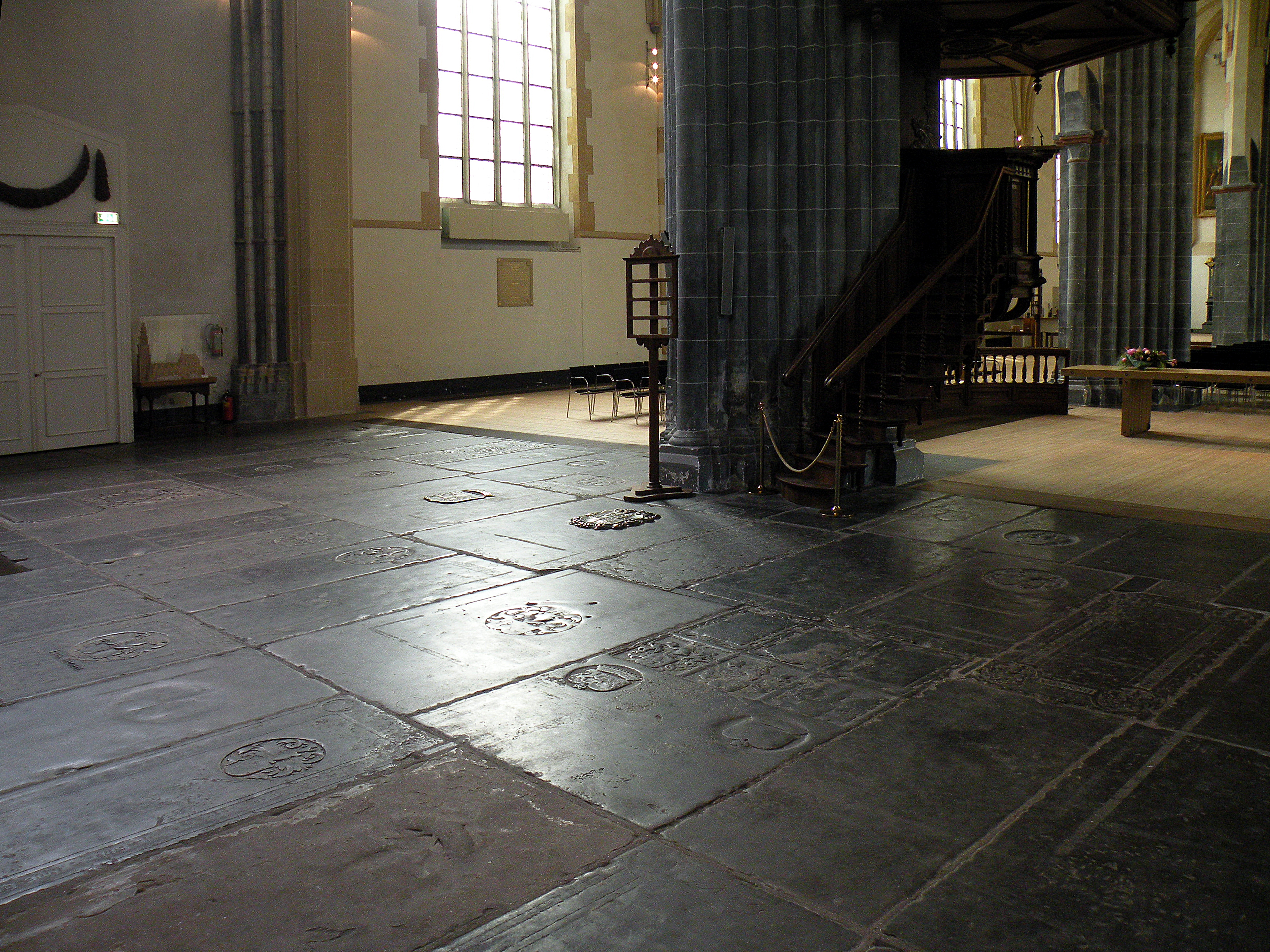 Groningen. Martinkirche